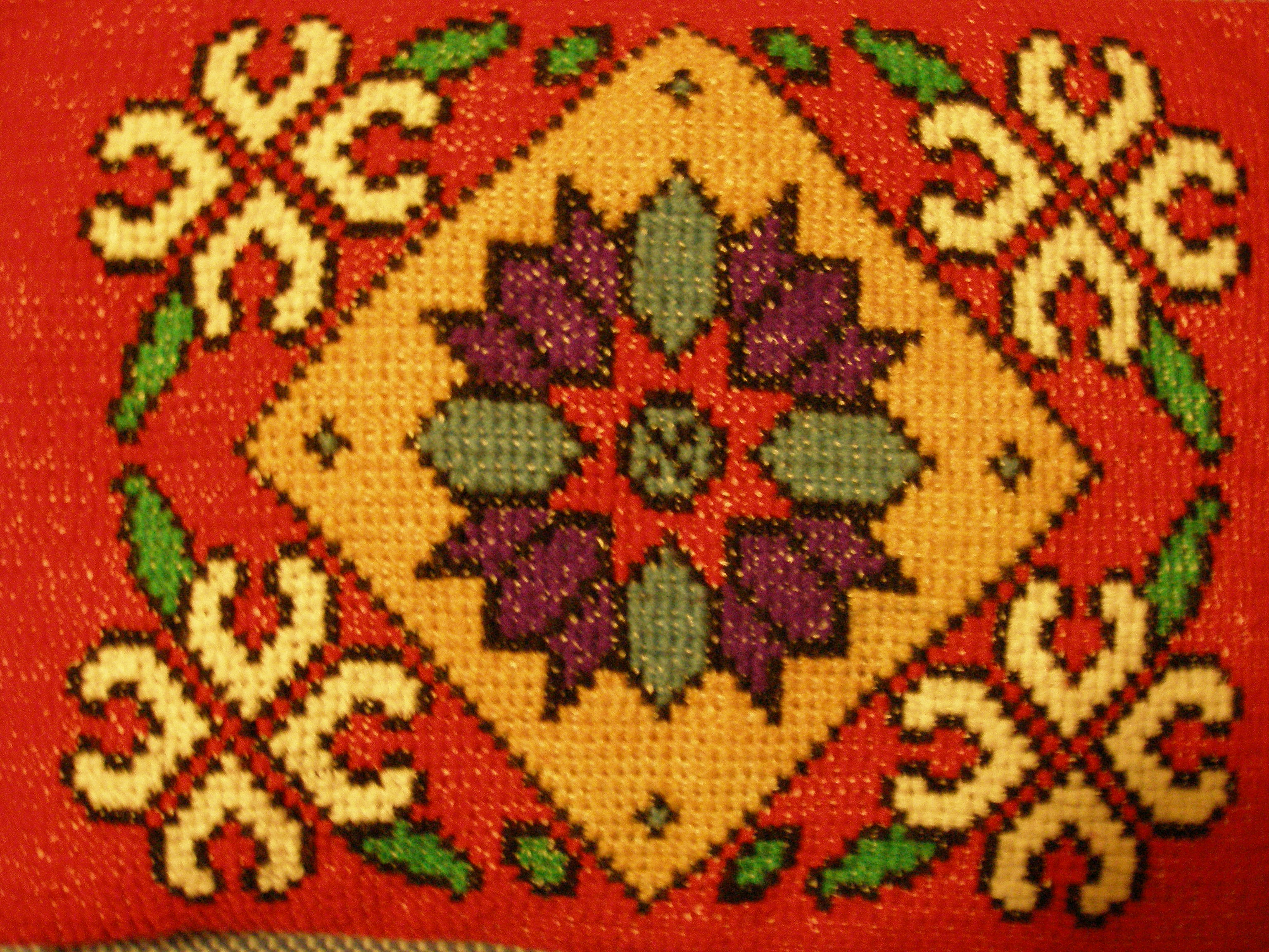 V.Kotuličová: slovenská ľudová krížiková výšivka.Obec Sedlice región Šariš.